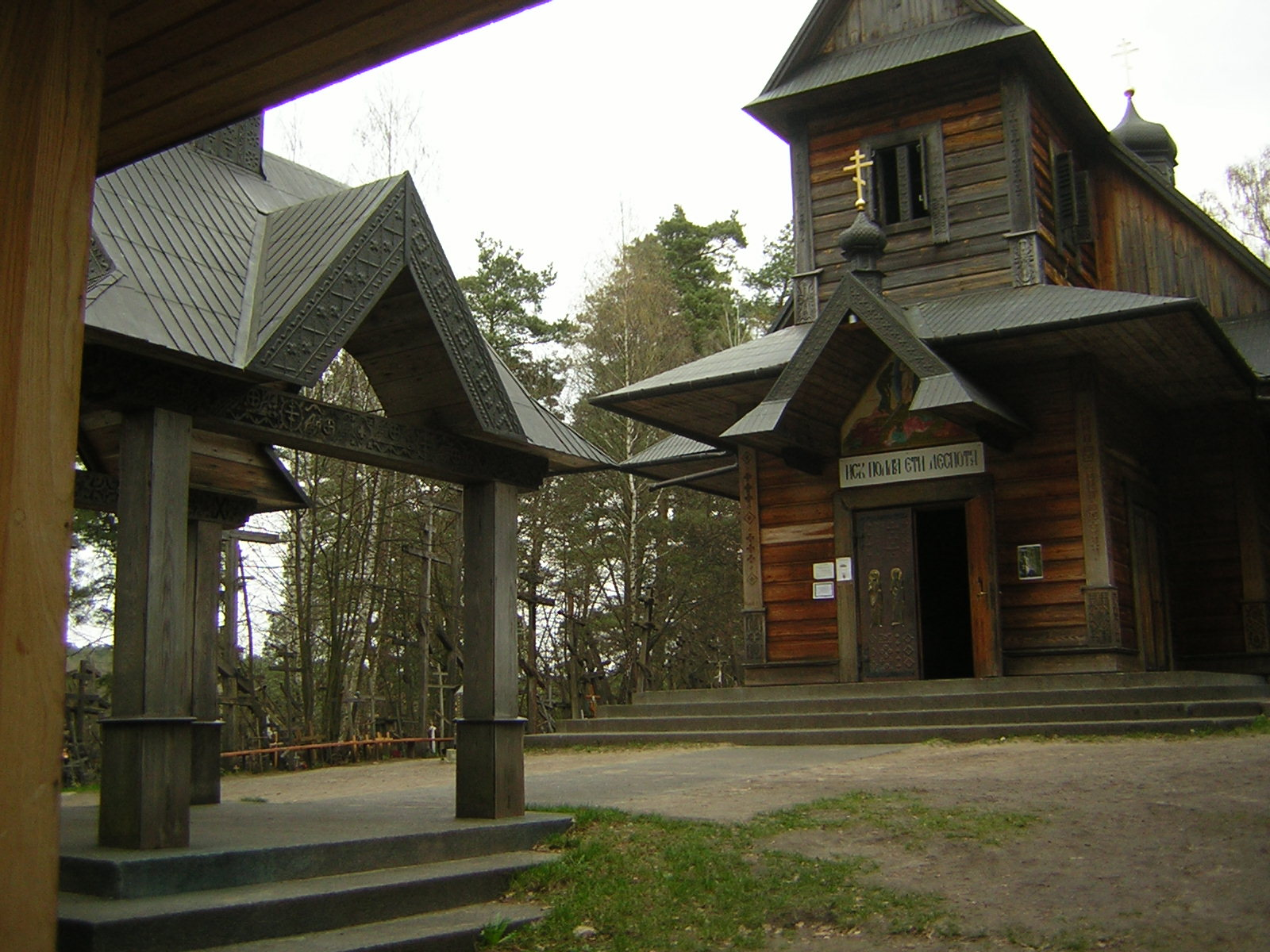 Święta góra prawosławia. Grabarka.